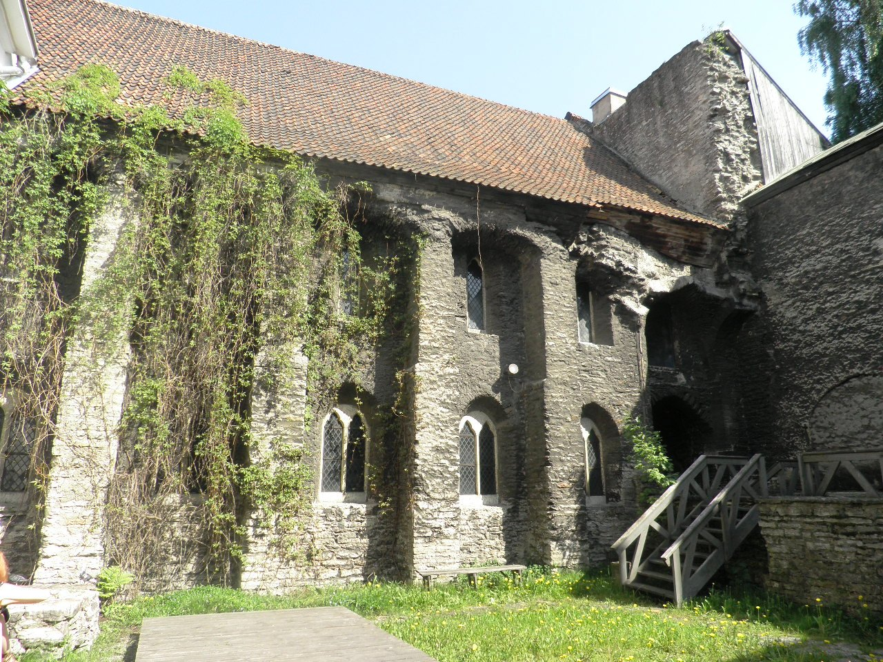 Dominiiklaste kloostri idaristikäigu välismüür hoovi poolt.